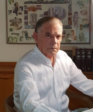 מוטי ברנוביץ